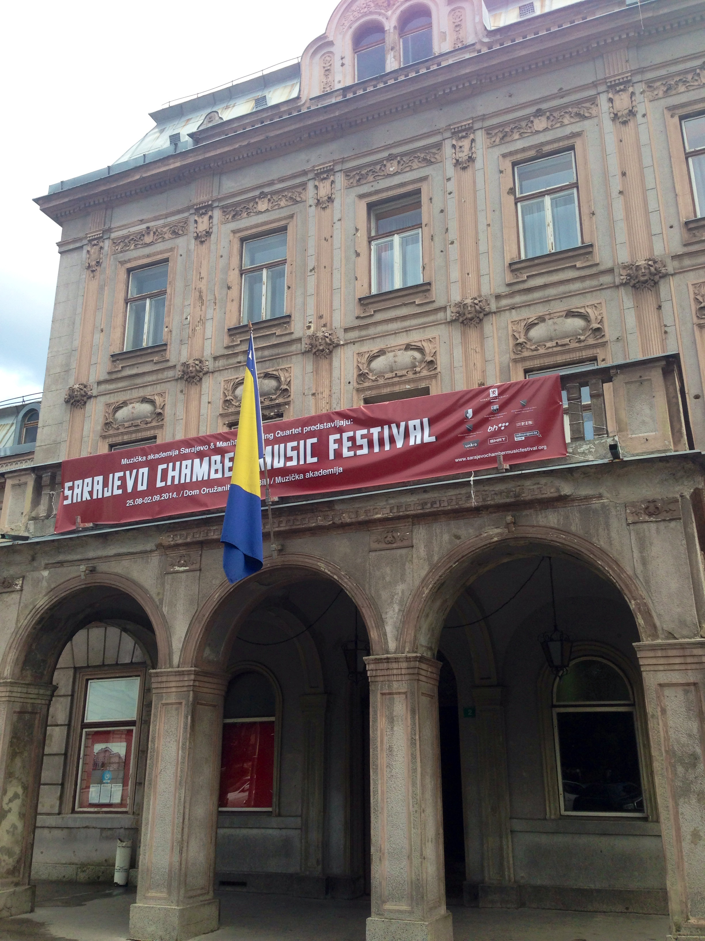 Sarajevo